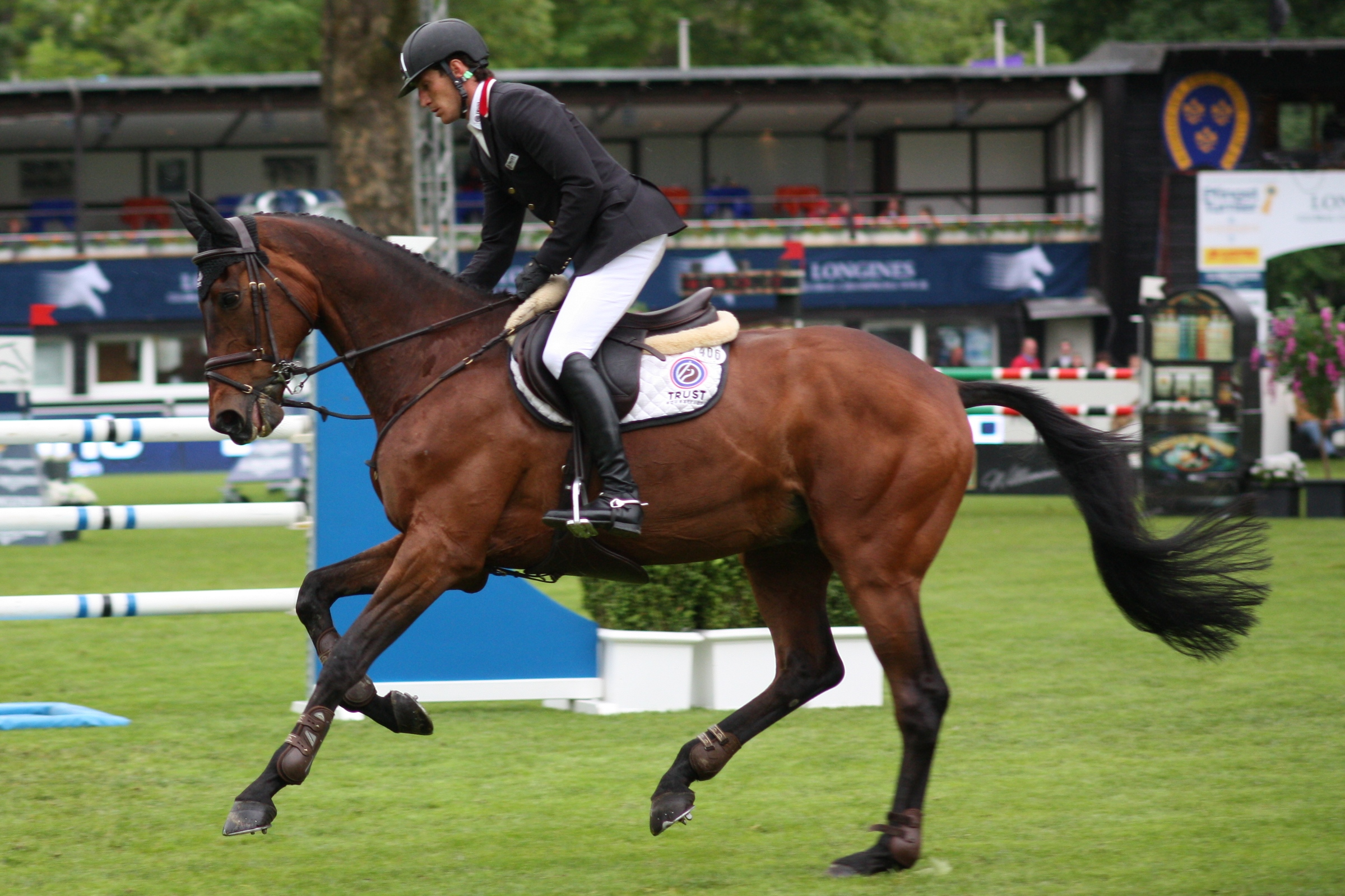 77. Internationanles Wiesbadener Pfingstunier 2013, CIC *** Vielseitigkeitsprüfung Springen, Dirk Schrade auf King Artus Personality rights warning Although this work is freely licensed or in the public domain, the person(s) shown may have rights that legally restrict certain re-uses unless those depicted consent to such uses. In these cases, a model release or other evidence of consent could protect you from infringement claims.